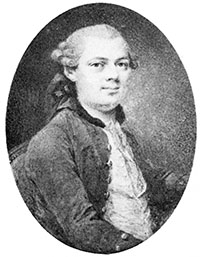 Niklas Lafrensen, Jr. (1737-1807). Self-portrait.